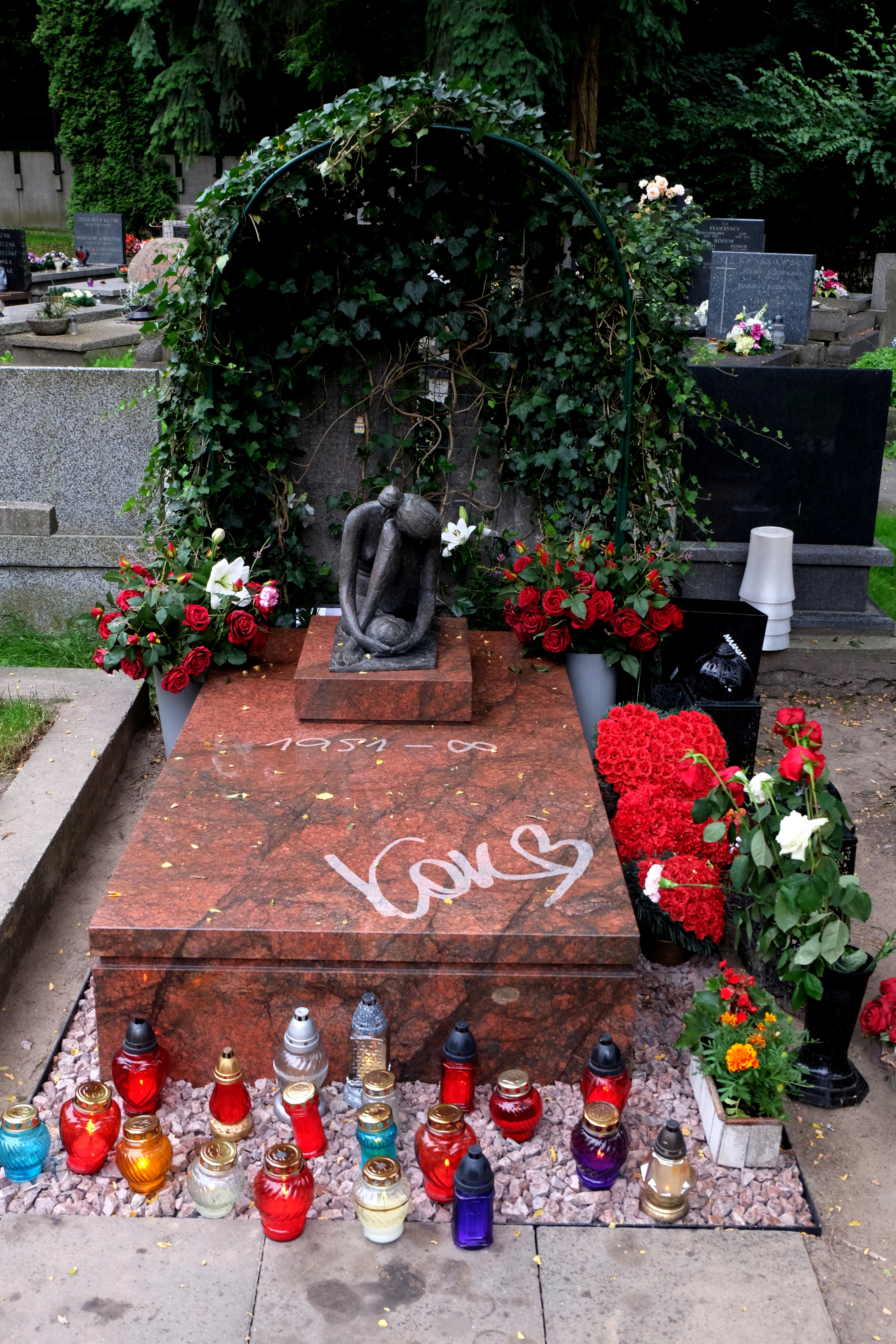 Grób wokalistki Kory (Olga Sipowicz) na Cmentarzu Wojskowym na Powązkach w Warszawie